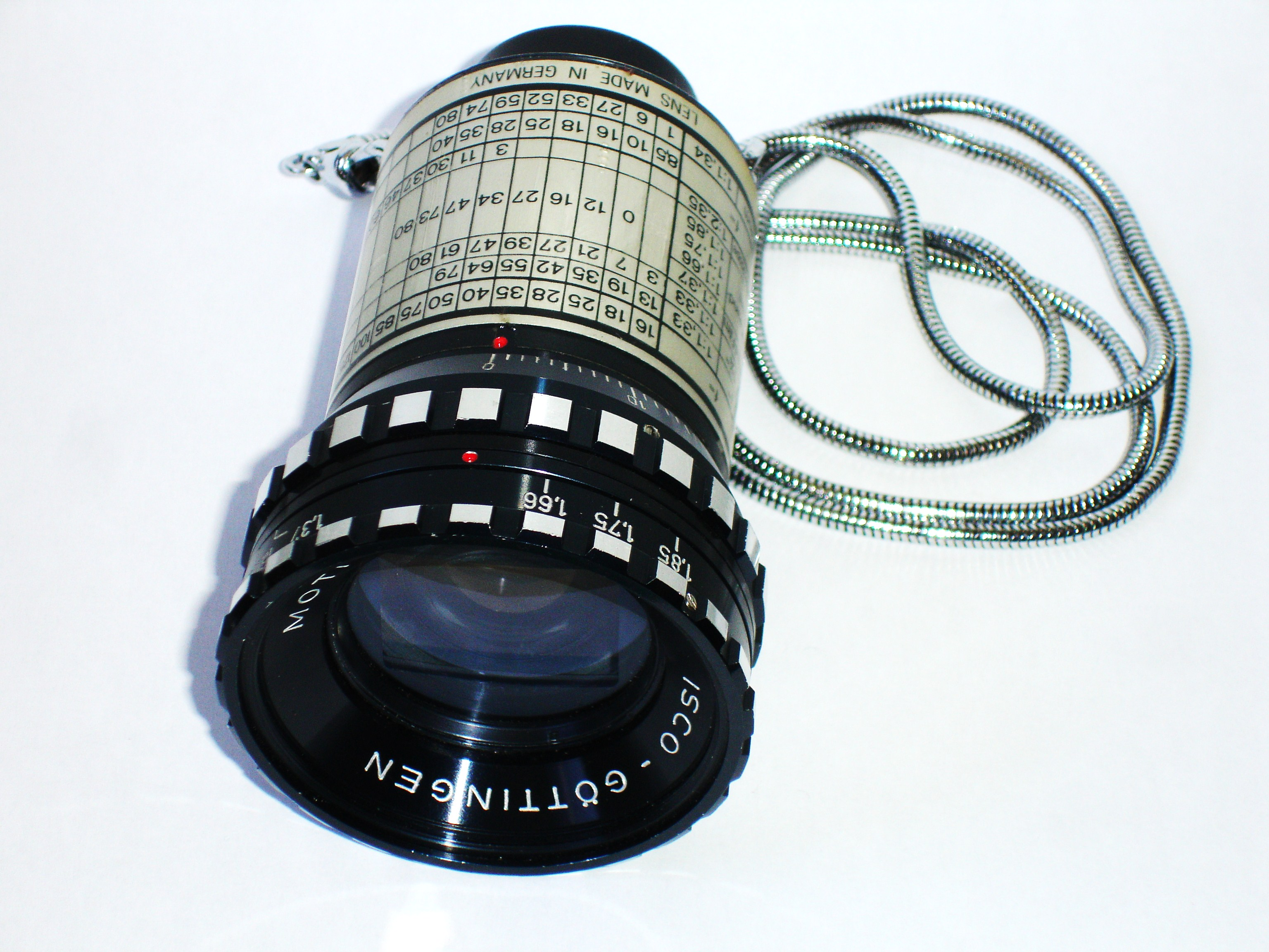 Chercheur de champ (viseur destiné au réalisateur pour repérer les emplacements et les cadrages de prise de vues)